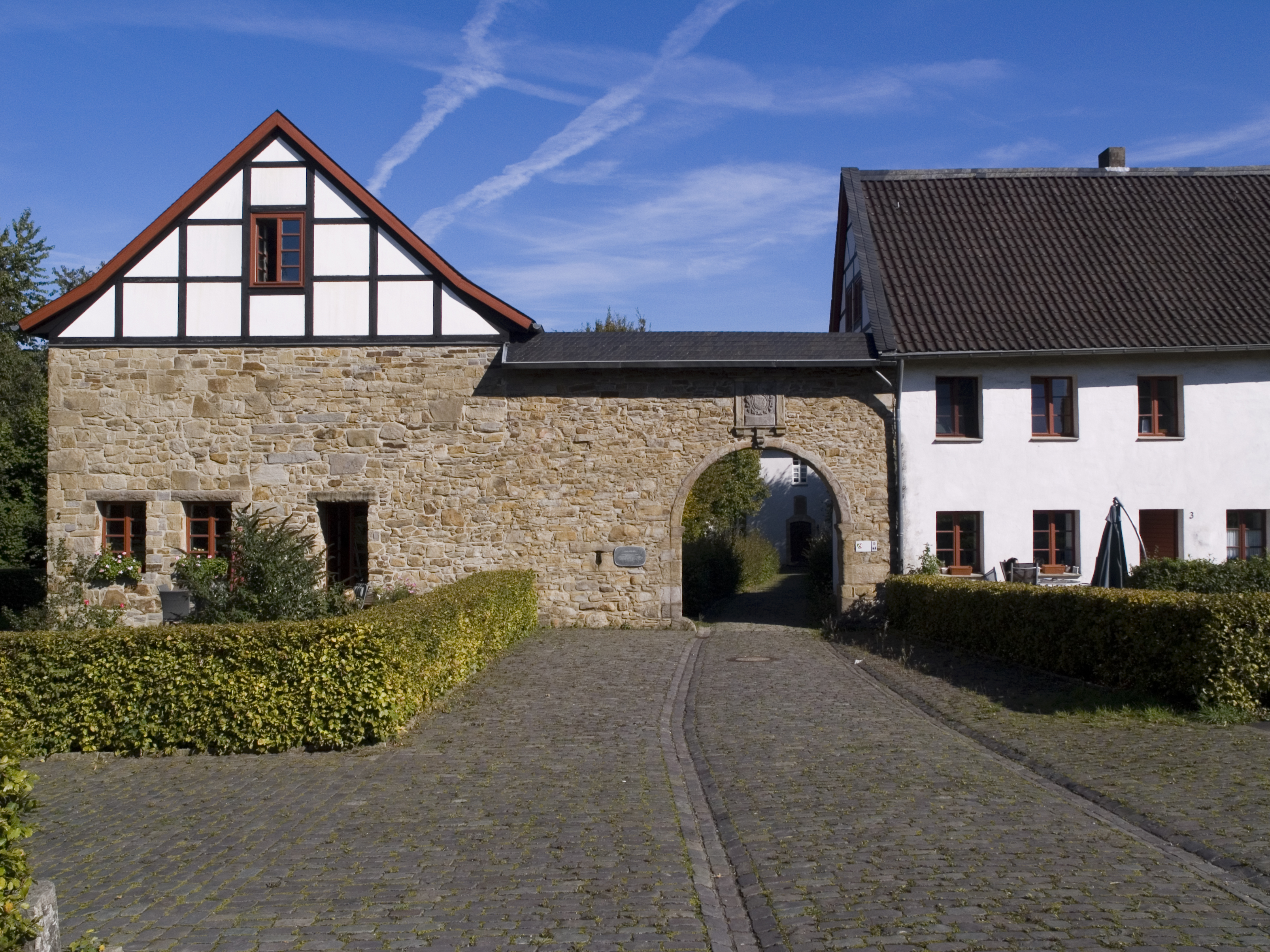 Северный Рейн - Вестфалия, Эссен - усадьба Хайзинген